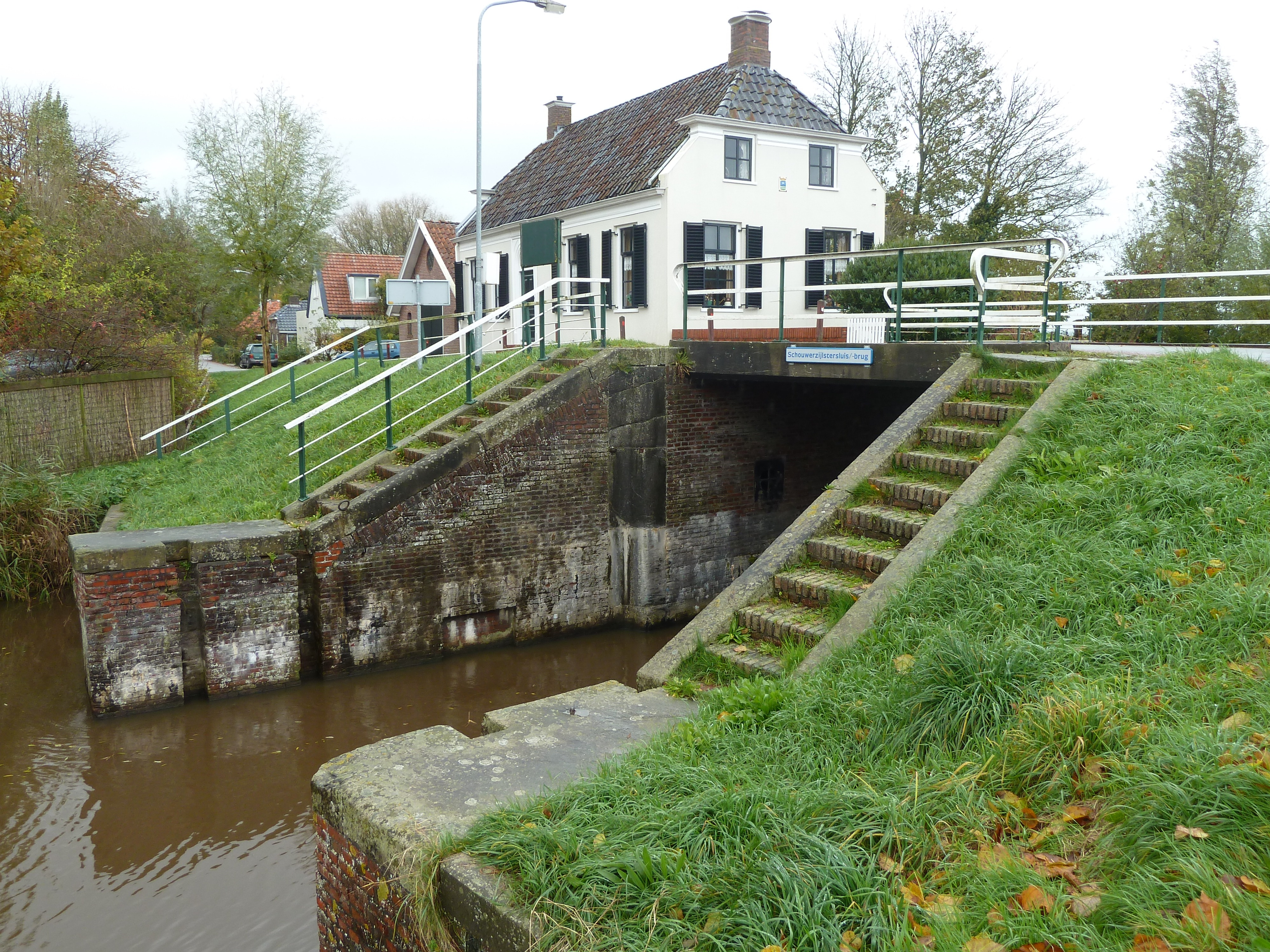 Gezicht op de zijl en het zijlhuis in Schouwerzijl.